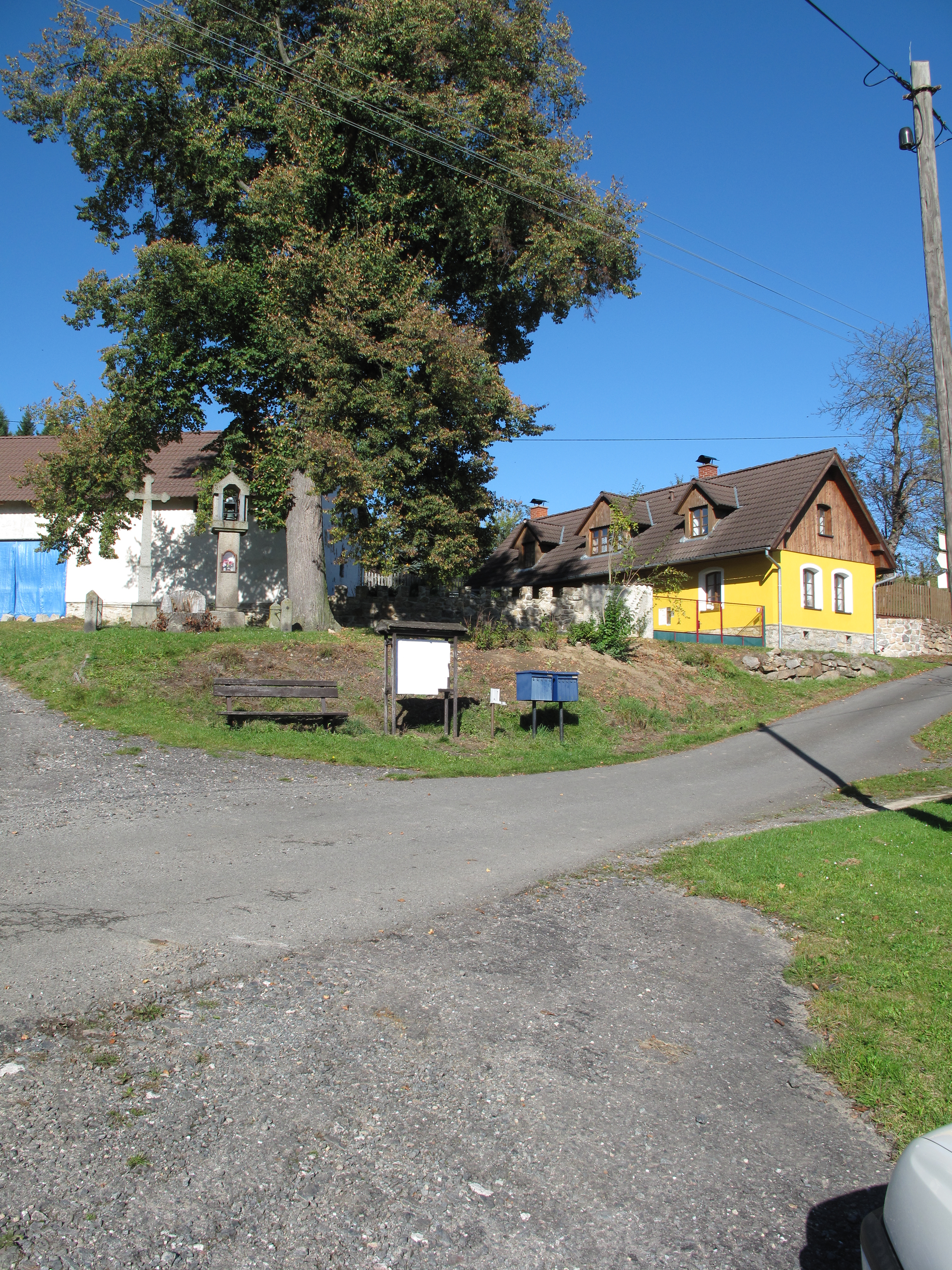 Strom v Křemenici. Okres Příbram, Česká republika.